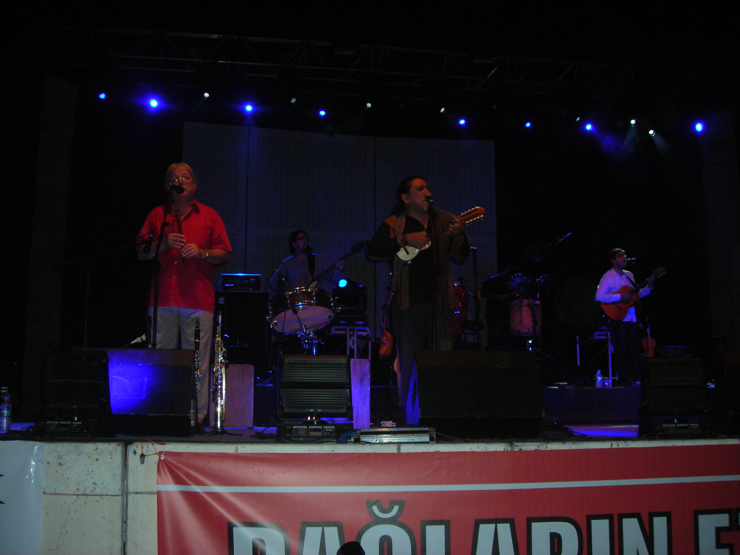 Inti-Illimani konseri, 3 Temmuz 2009, Istanbul